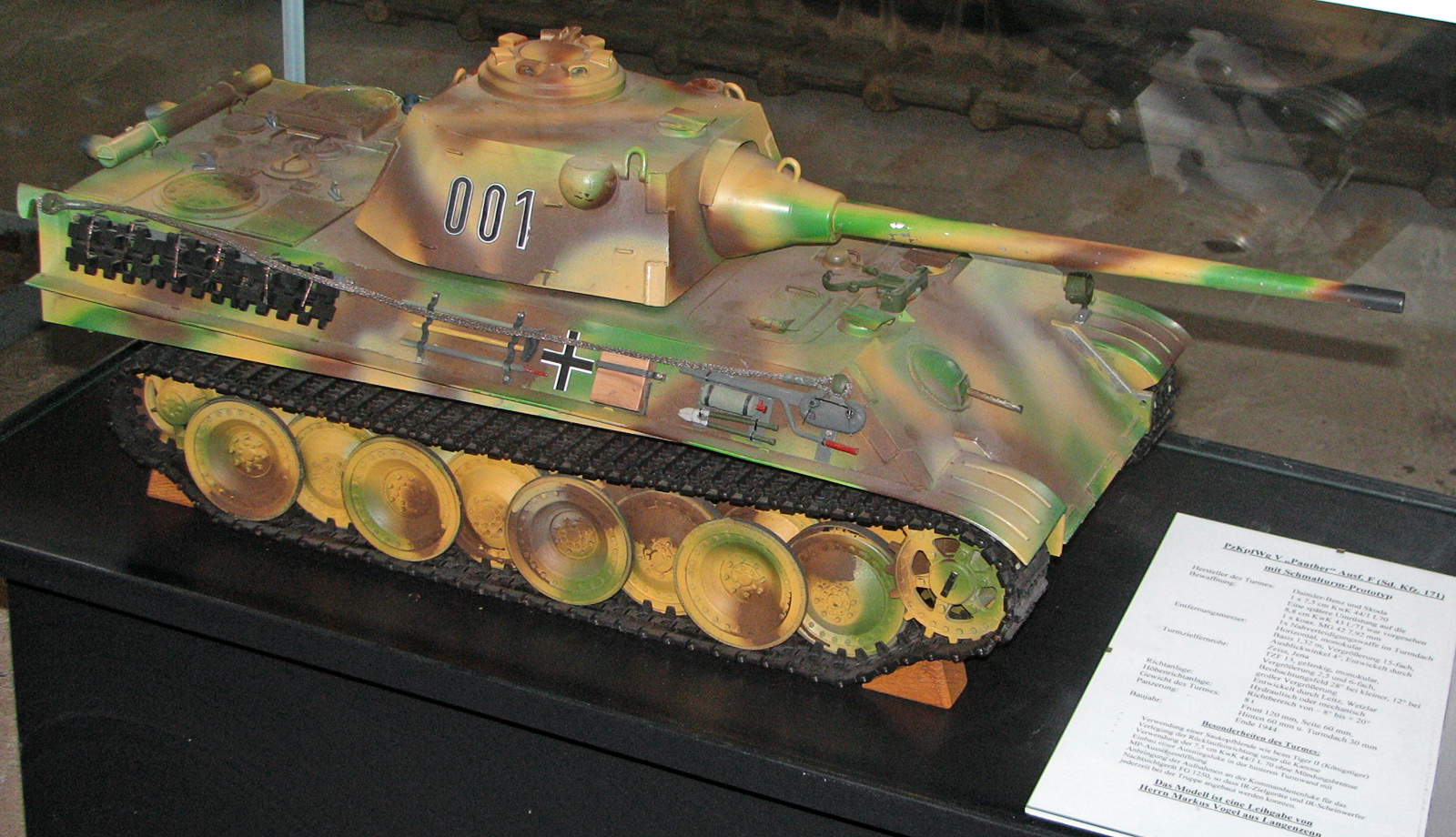 Sonderkraftfahrzeug (Sd.Kfz.) der Deutschen Wehrmacht bis 1945, hier: Sd.Kfz. 171, Panzerkampfwagen V (Pz.Kpfw. V), auch Panzer V "Panther", Ausfertigung: D, A und G (Ausf. F nur Planung). Aktuelles Bild: "Panther", Ausf. F (Modell) mit Schmalturm und 8,8-cm-KwK 43, ausgestellt im Deutschen Panzermuseum zu Munster.